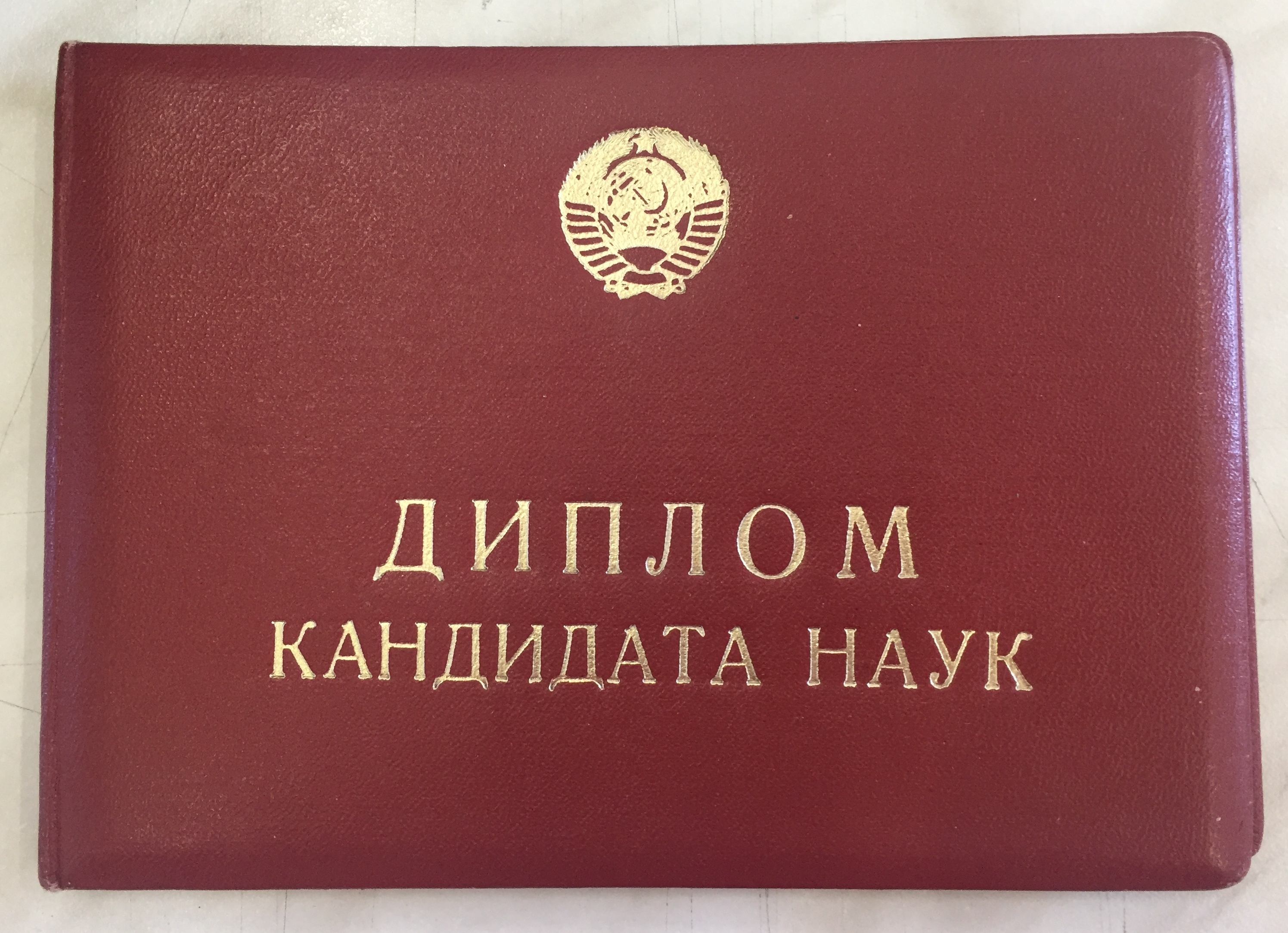 Диплом кандидата наук